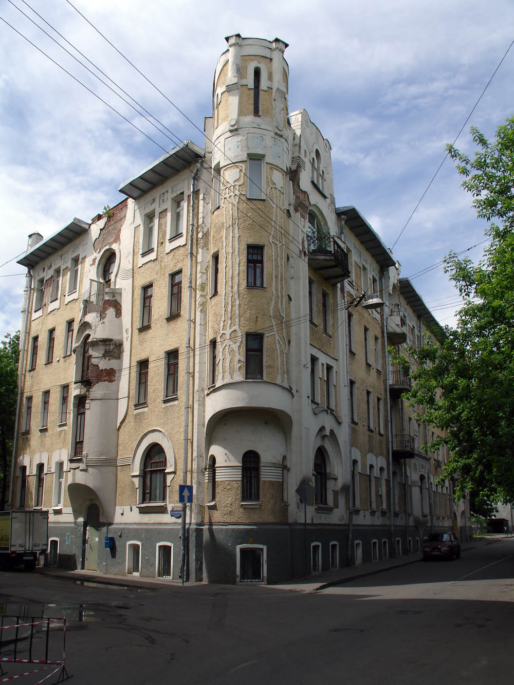 Доходный дом Н.Г. Тарховой - Москва, Подсосенский 18 (Казарменный 5). Арх. Г. И. Макаев (он же девелопер и первый владелец дома), 1903.